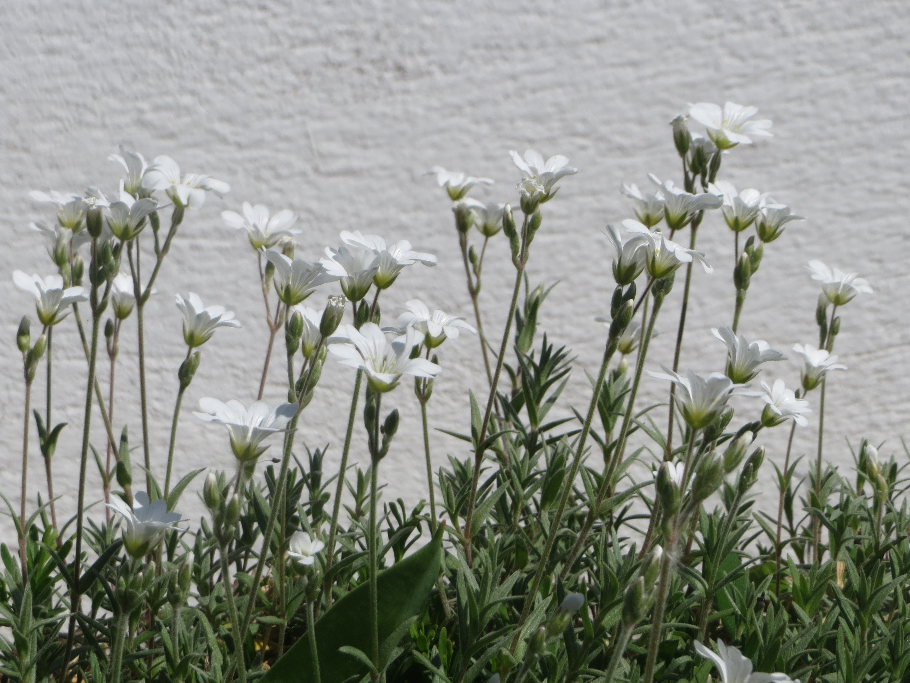 Acker-Hornkraut (Cerastium arvense) in Hockenheim